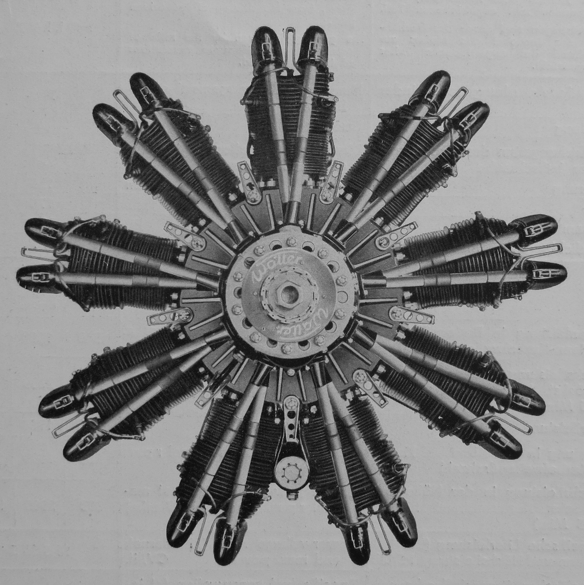 letecký motor Walter Pollux II (1934)